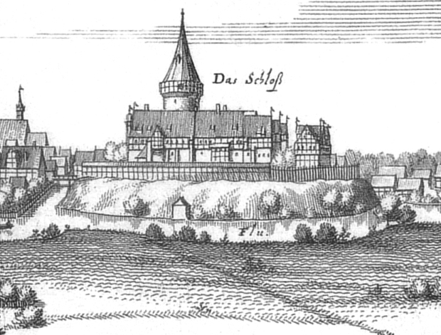 Teilansicht der Stadt Dannenberg (Elbe) mit dem Schloss und der Sankt-Johannis-Kirche. Kupferstich von Matthäus Merian aus dem Jahr 1654.